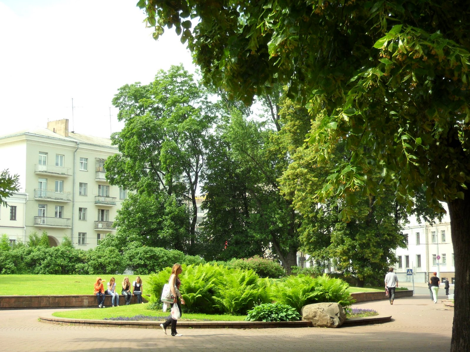 Михайловский сквер